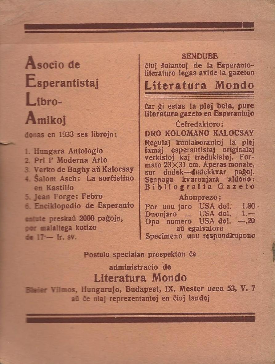 kovrilo (malantauxe) de "Dancu Marionetoj!", 1933